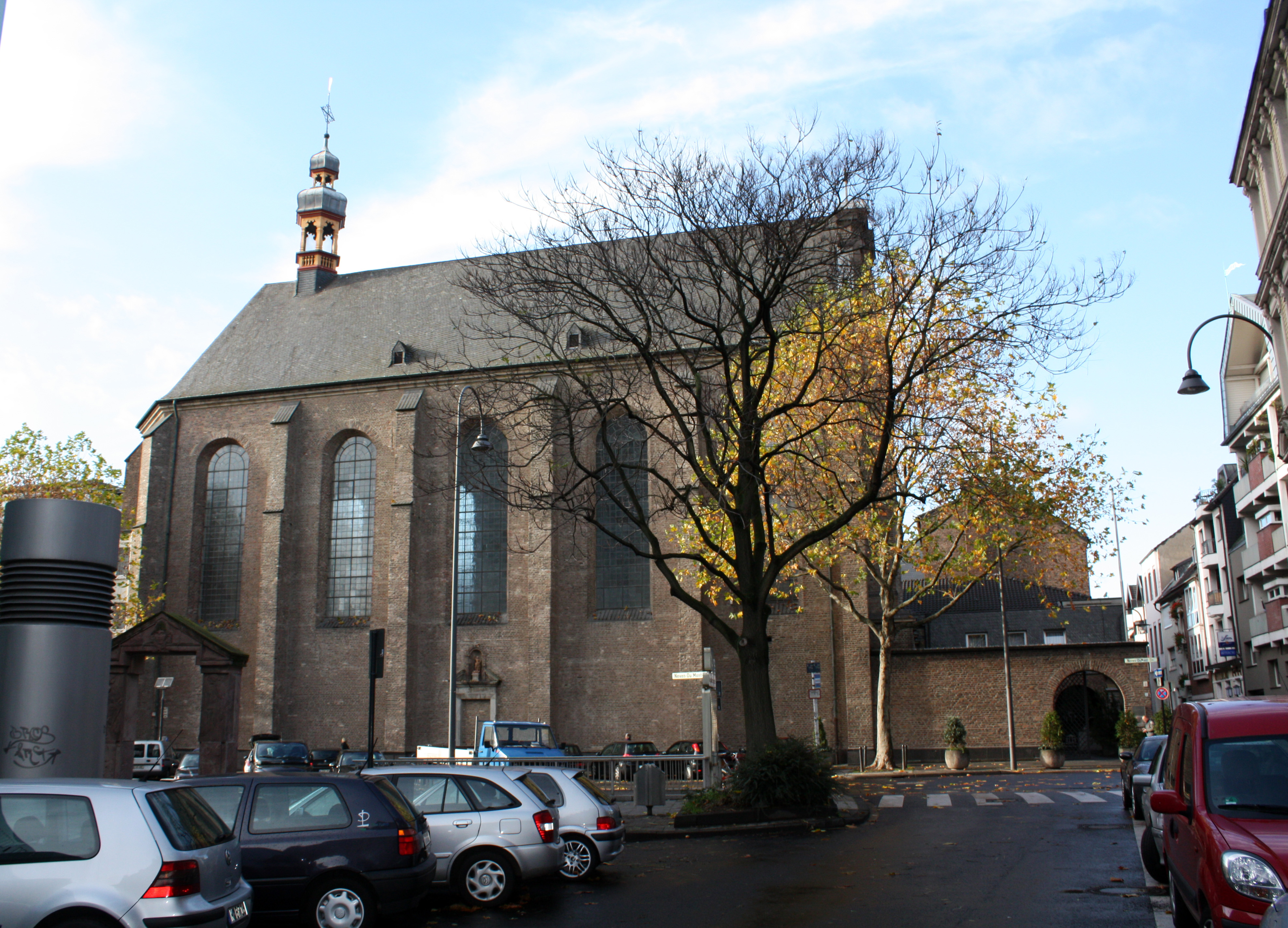 Köln, St. Maria in der Kupfergasse, Blick aus der Kupfergasse